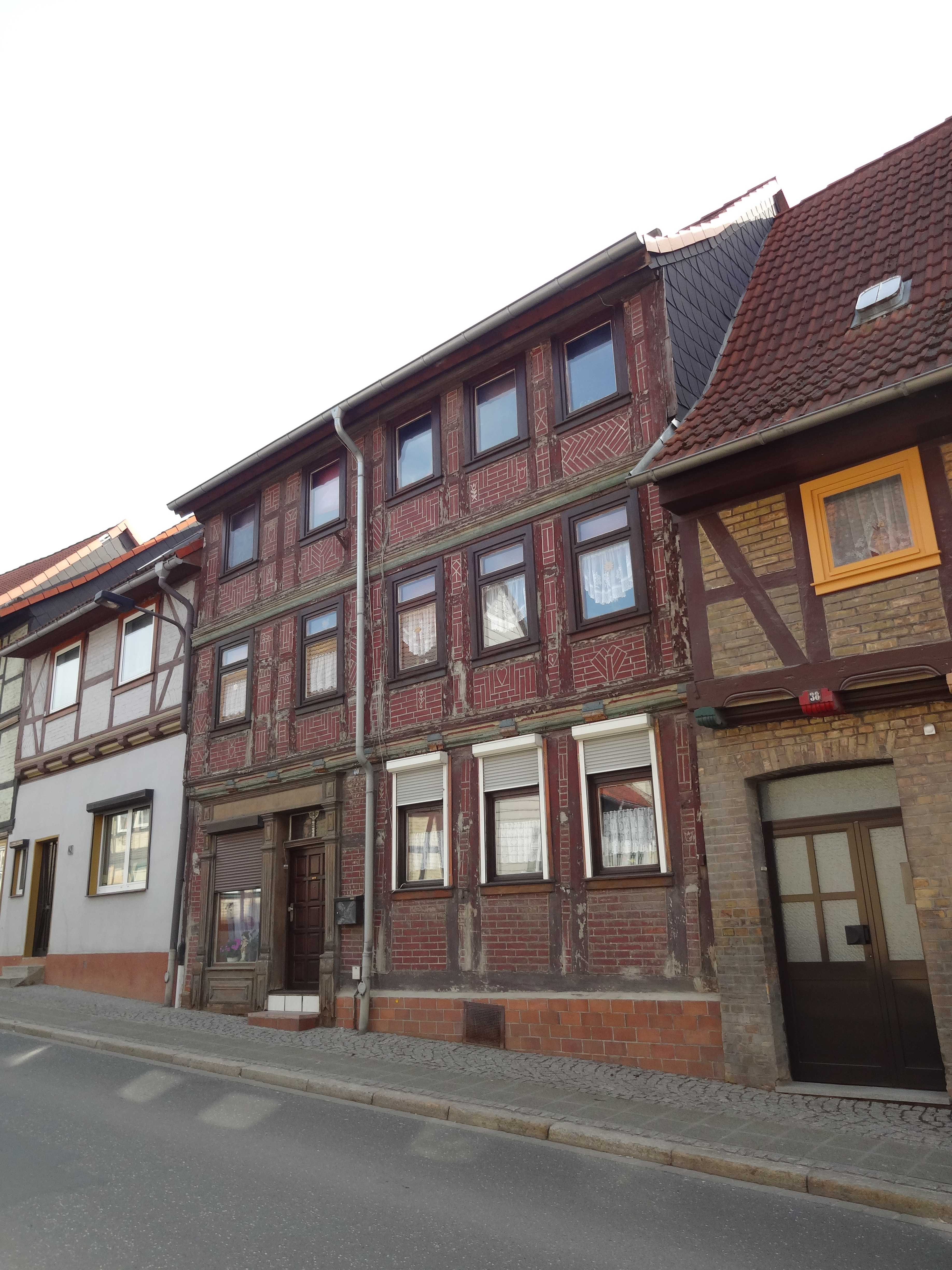 denkmalgeschütztes Fachwerkhaus in der Halberstädter Straße 40 in Derenburg, Ortsteil von Blankenburg (Harz)